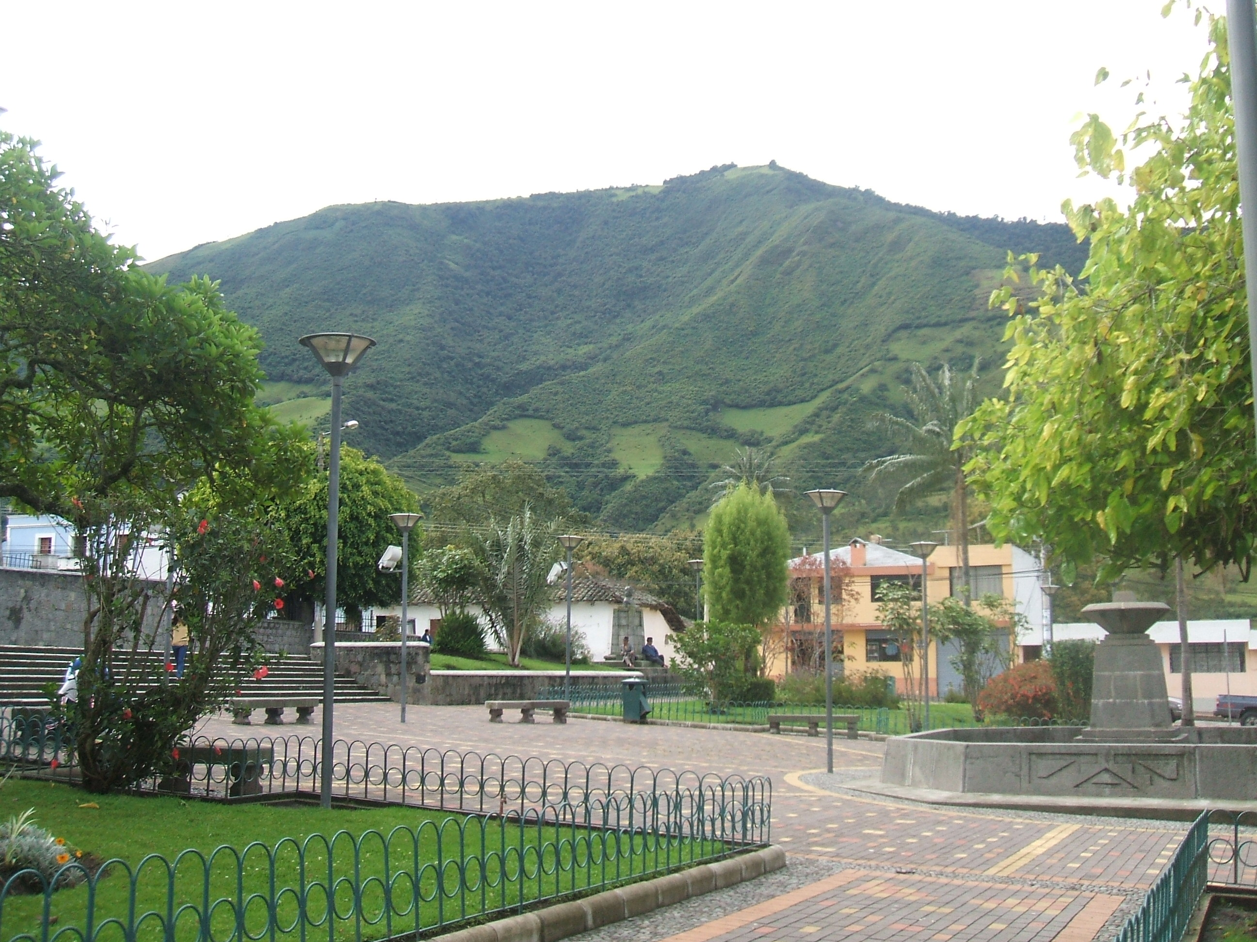 Detalle del parque central de la cabecera parroquial de Atahualpa